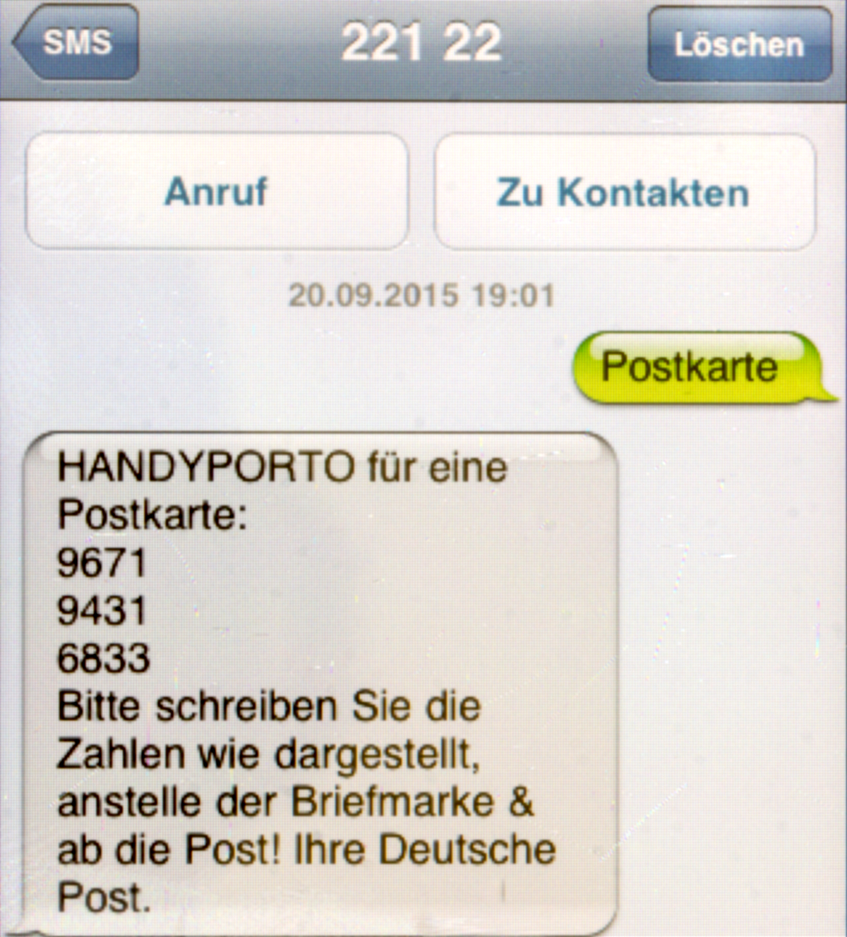 SMS der Deutschen Post mit dem Code für die Frankierung mittels Handyporto, angefordert mit dem Wort "Postkarte"